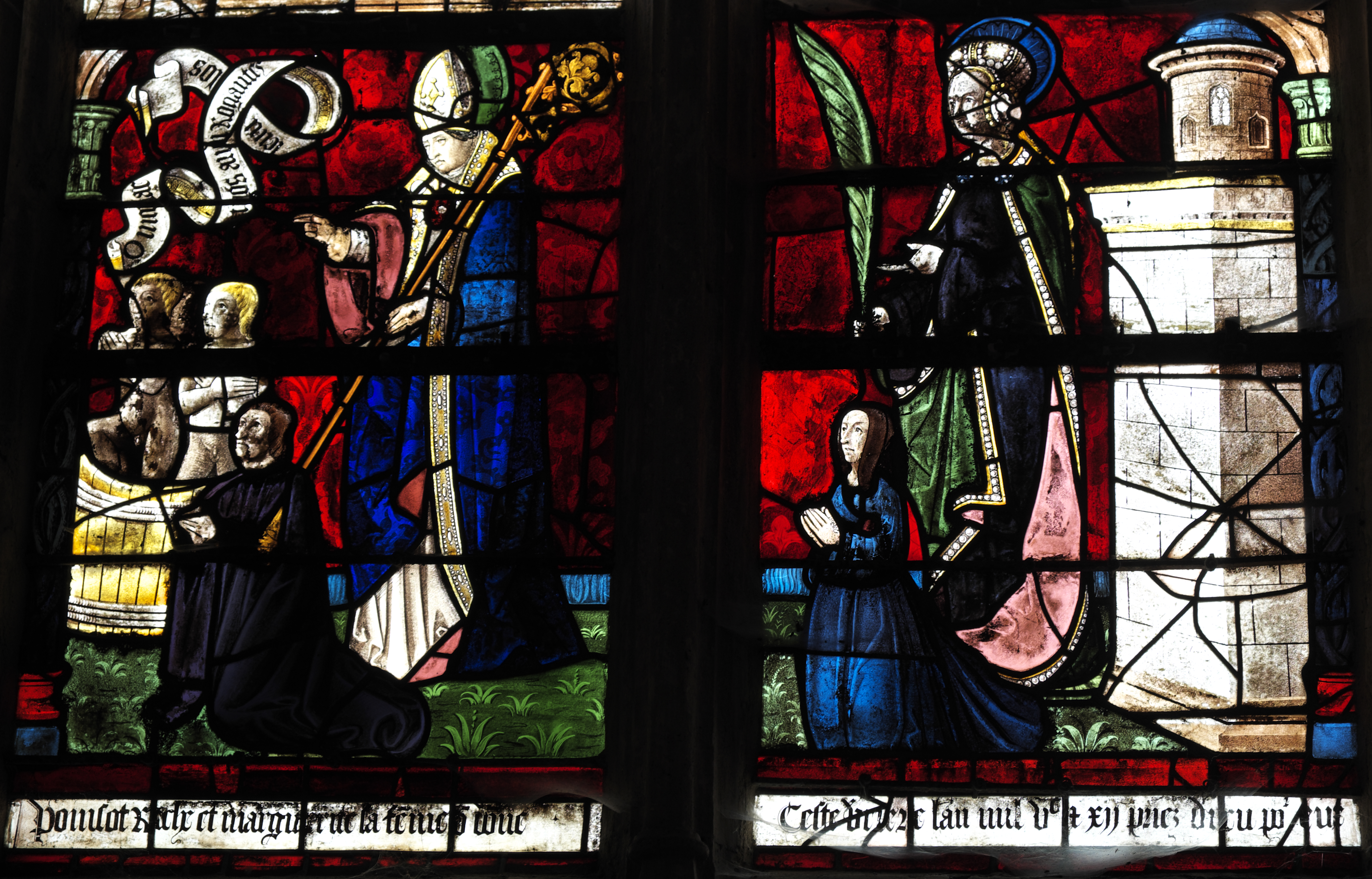 Katholische Kirche Saint-Remi in Ceffonds im Département Haute-Marne (Champagne-Ardenne/Frankreich), Bleiglasfenster (baie 2) im Chor, von 1512; Darstellung: Auferstehung und Erscheinungen Jesu; Ausschnitt unten: Stifter mit Schutzpatronen, hl. Nikolaus mit den drei Scholaren (links), hl. Barbara (rechts) .